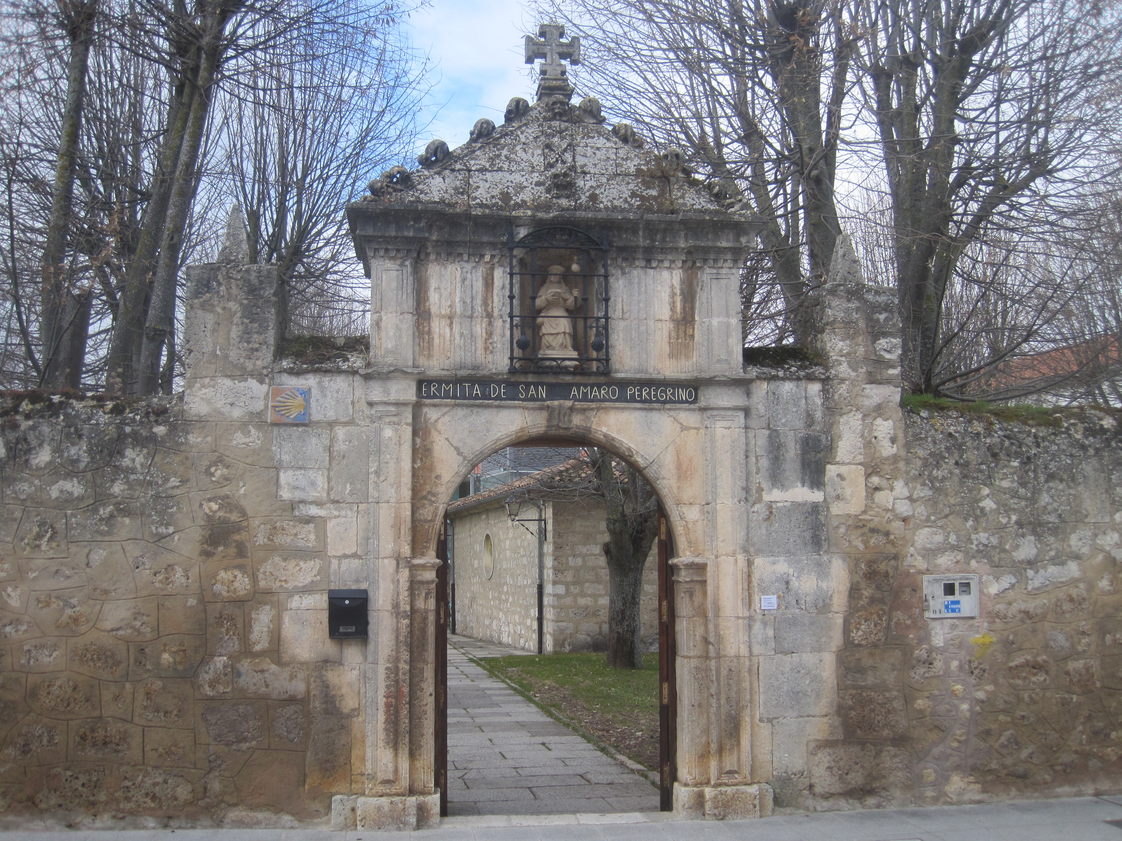 Entrada al santuario de San Amaro, en Burgos.